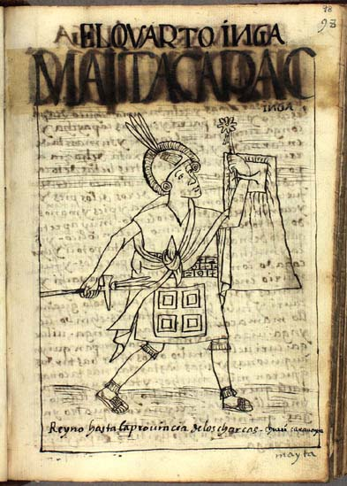 Illustration from the book El primer nueva corónica y buen gobierno